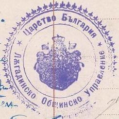 Печат на Лъгадинското общинско управление.